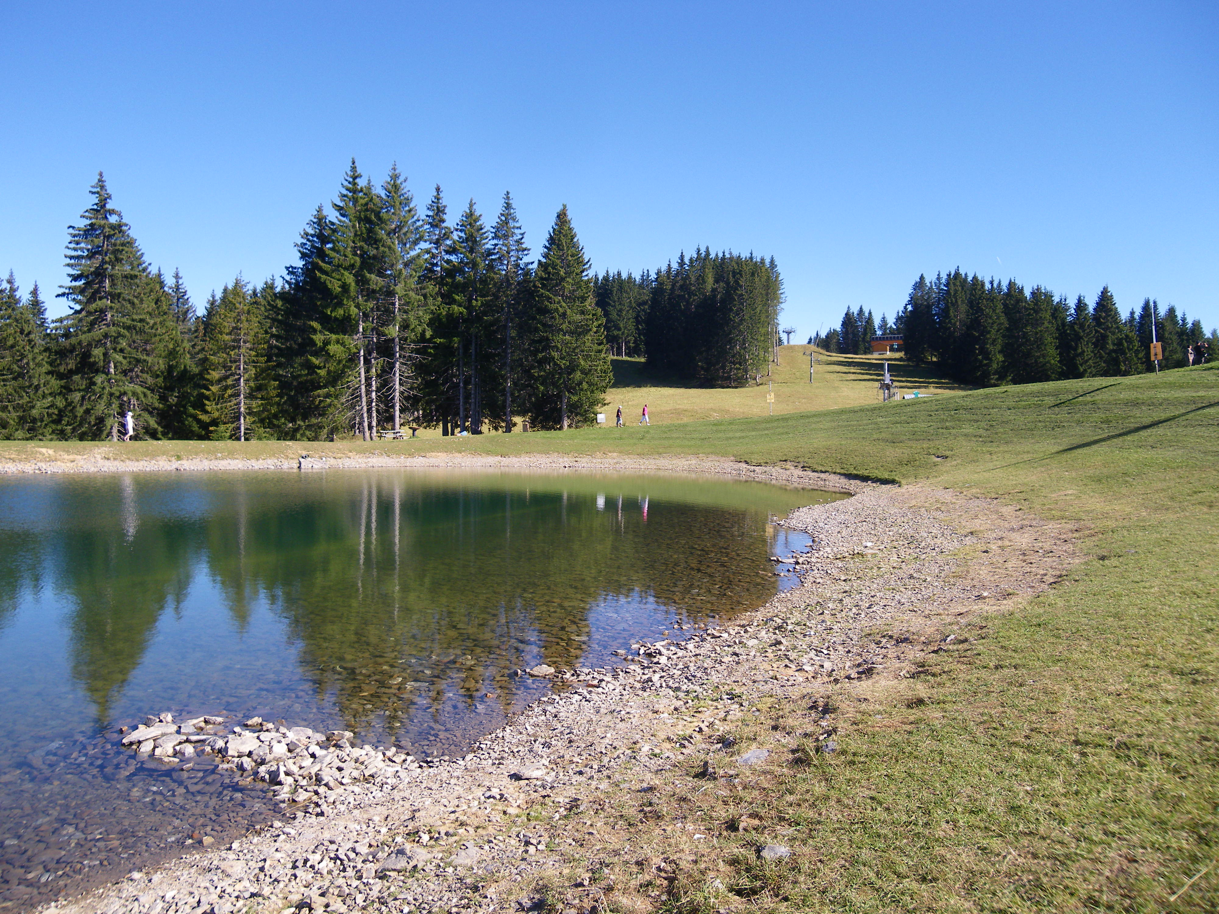 le lac du mont lachat